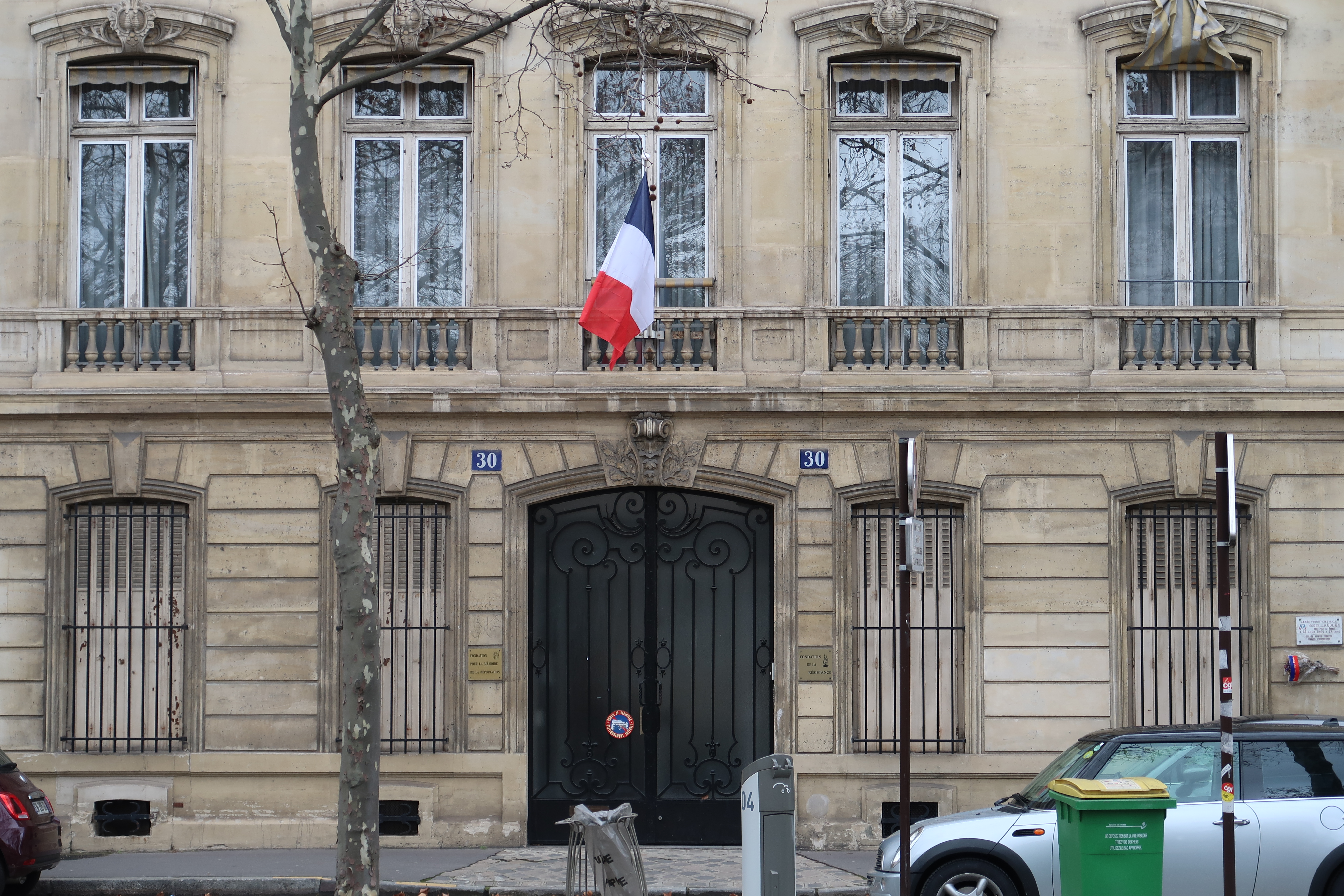 Fondation pour la mémoire de la déportation et de la fondation de la Résistance, 30 boulevard des Invalides (Paris, 7e).